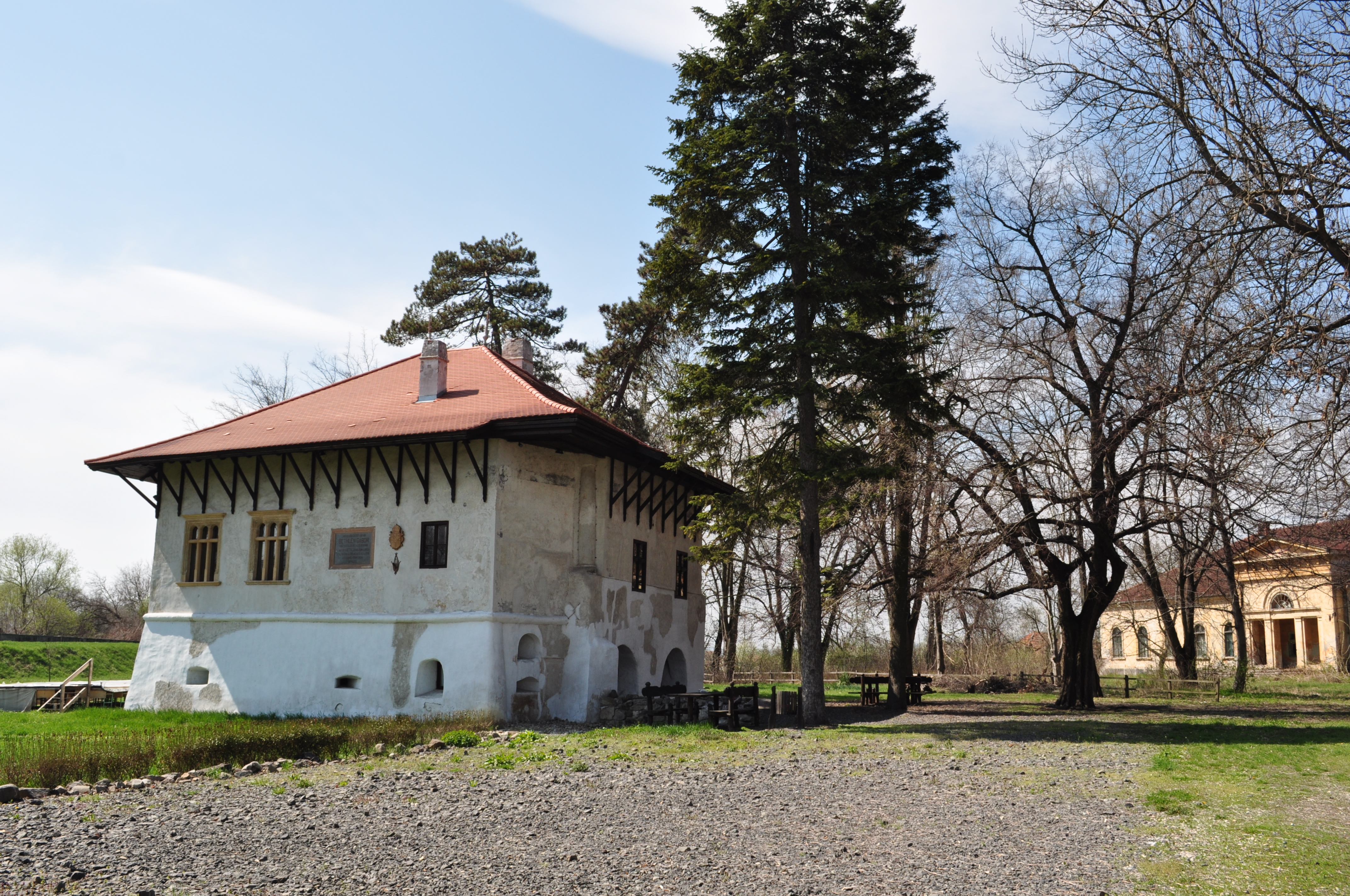 Casa natală Gabriel Bethlen (Bastionul Roşu) din Ilia